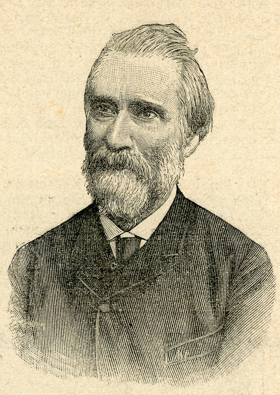 Il comm. Gennaro Celli, procuratore generale del Re a Milano, assassinato il 17 gennaio (xilografia).